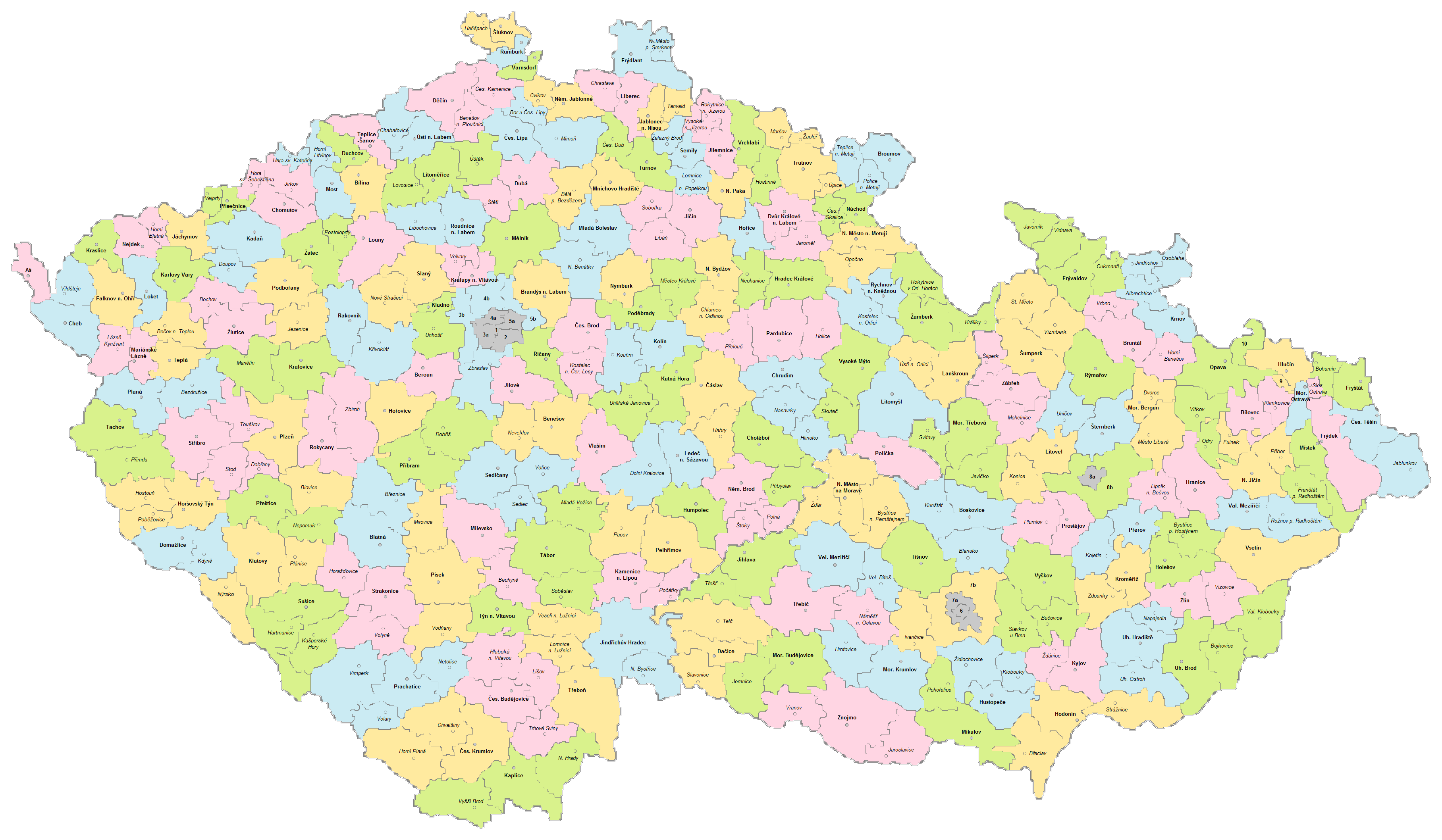 Schematická mapka politických a soudních okresů v zemi České a Moravskoslezské k roku 1938. Každý politický okres zahrnuje jeden či více okresů soudních (kromě okresu Moravský Beroun je vždy v sídle politického okresu i sídlo okresního soudu). Zvláštními výjimkami jsou: Praha – hlavní město Praha obsahuje celé soudní okresy Vnitřní Praha (1) a Praha-jih (2) a části soudních okresů Praha-východ (3a), Praha-sever (4a) a Praha-západ (5a), jejich zbývající části (3b, 4b a 5b) tvoří spolu se soudním okresem Zbraslav politický okres Praha-venkov; Brno – zemské hlavní město Brno obsahuje celý soudní okres Brno-město (6) a část soudního okresu Brno-okolí (7a), jeho zbývající část (7b) tvoří spolu se soudním okresem Ivančice politický okres Brno-venkov; Olomouc – soudní okres Olomouc je tvořen městem Olomouc (8a) a politickým okresem Olomouc-venkov (8b); Hlučín – politický okres Hlučín obsahuje severní část soudního okresu Klimkovice (9) a naopak západní část soudního okresu Hlučín (10) spadá pod politický okres Opava. Příslušnost soudních okresů do obvodů jednotlivých krajských soudů je znázorněna v souboru Soudní okresy 1930.png.